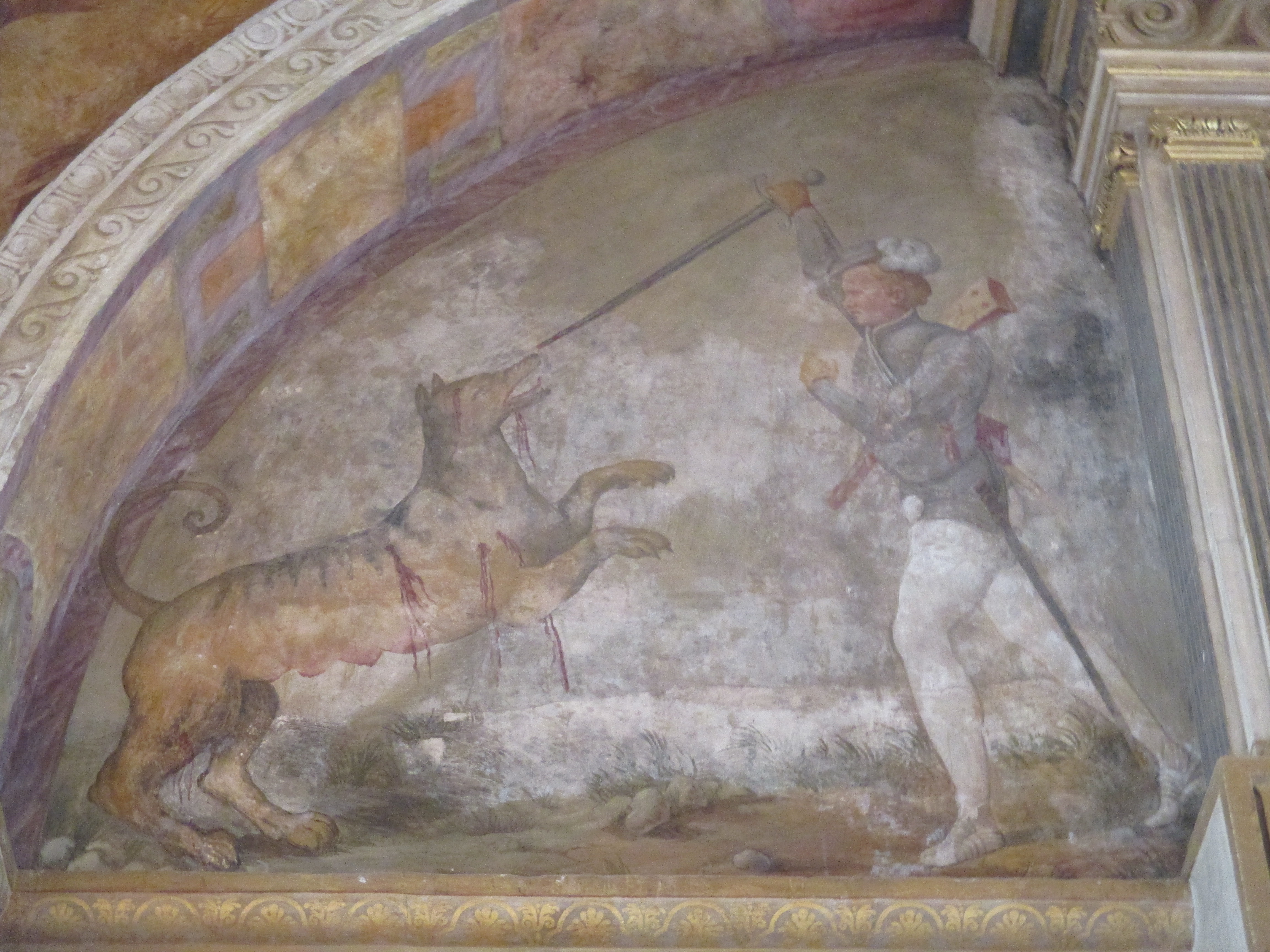 Fresque de la salle de Bal du château de Fontainebleau. Sébastien de Rabutin tuant un loup-cervier de Nicolò dell'Abate. Sébastien de Rabutin était huissier de la porte d'Henri II. Il combattit un loup-cervier en 1548 dans la forêt d'Orléans. Le roi fit faire cette fresque en mémoire de cet exploit.